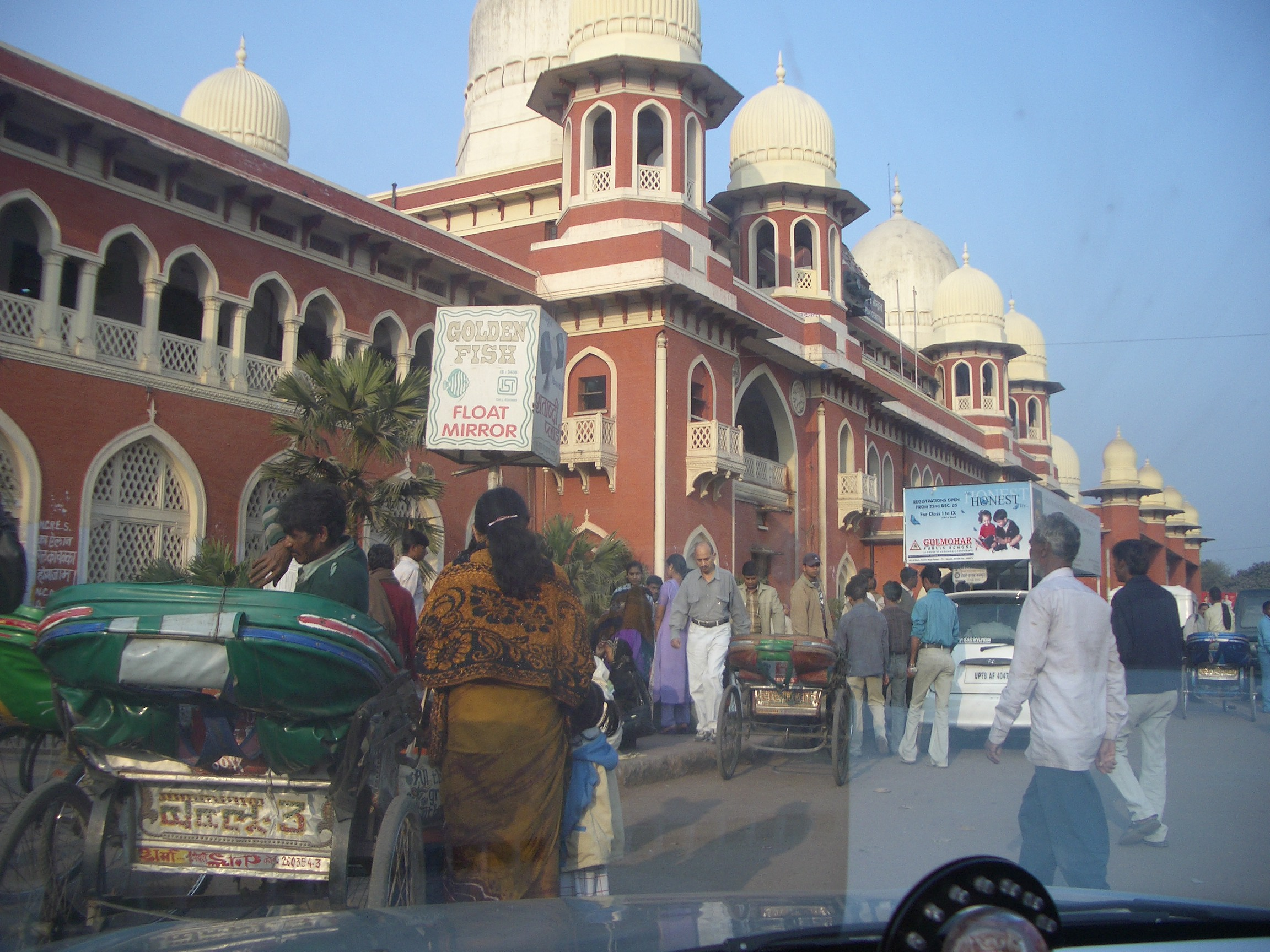 0189 Kanpur - Bahnhof 2006-02-08 16-31-48